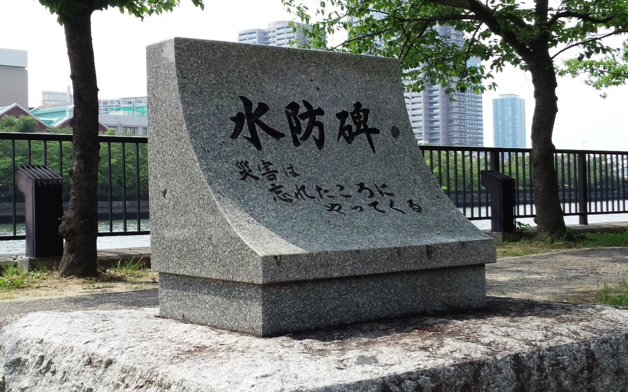 明治大洪水の石碑・旧淀川